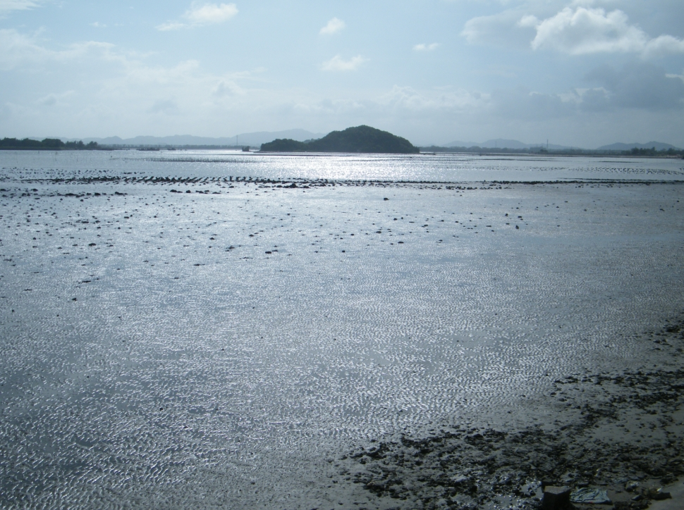 夏天在濠江东堤拍下濠江中的龟山